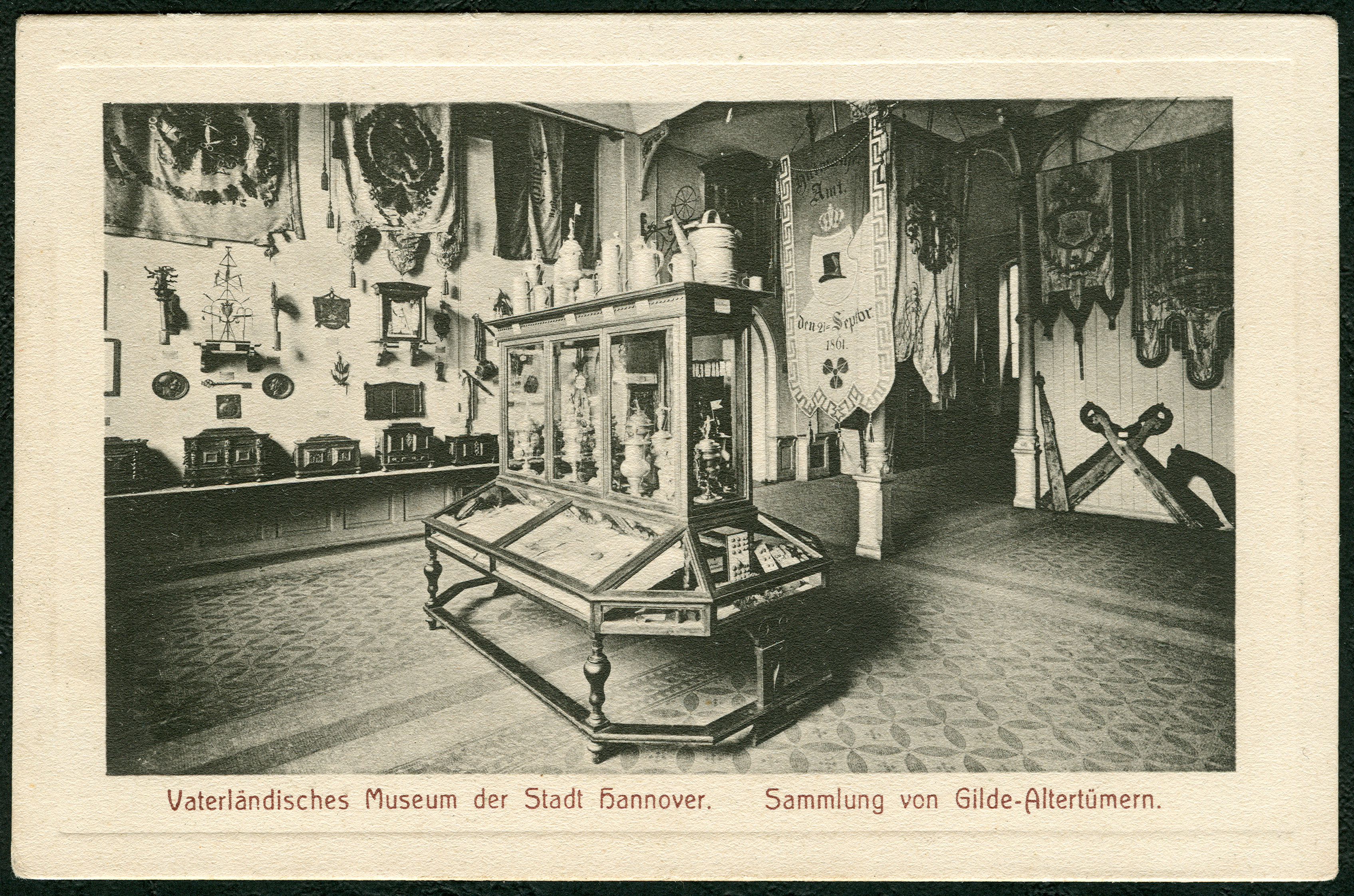 Ansichtskarte „Graph. Kunstanstalt Georg Alpers jun., Hannover 1907. Serie B. 1“ (siehe unten). Die in braunroter Schrift hinzugefügte Untertitelung lautet „Vaterländisches Museum der Stadt Hannover. Sammlung von Gilde-Altertümern“ wobei die hier dargestellte Sammlung auch Objekte der Handwerkskunst der ehemaligen Zünfte enthielt. Literatur (Auswahl): Franz Rudolf Zankl: Ausstellung der Gildealtertümer im Vaterländischen Museum. Fotografie um 1910, in ders. (Hrsg.): Hannover Archiv, Blatt K 12 ...